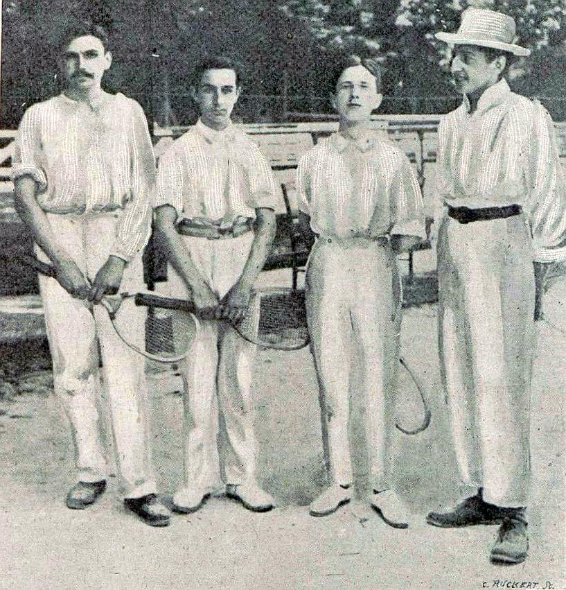 G. à D. Gillon, Max Decugis, Maurice Germot et Marcel Vacherot, vainqueur du championnat interscolaire de tennis en juin 1900.